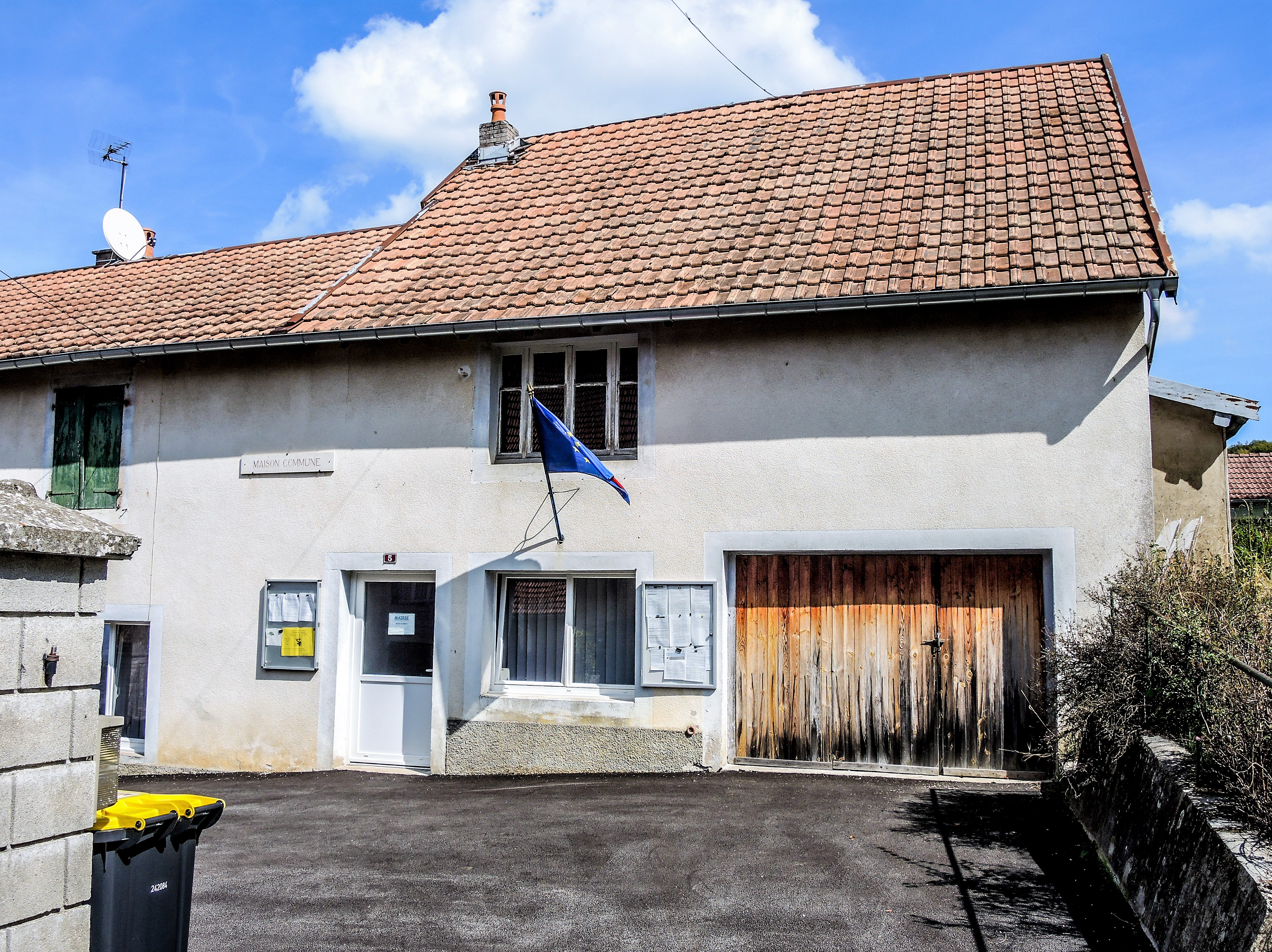 Façade de la mairie du village de Lanthenans. Doubs